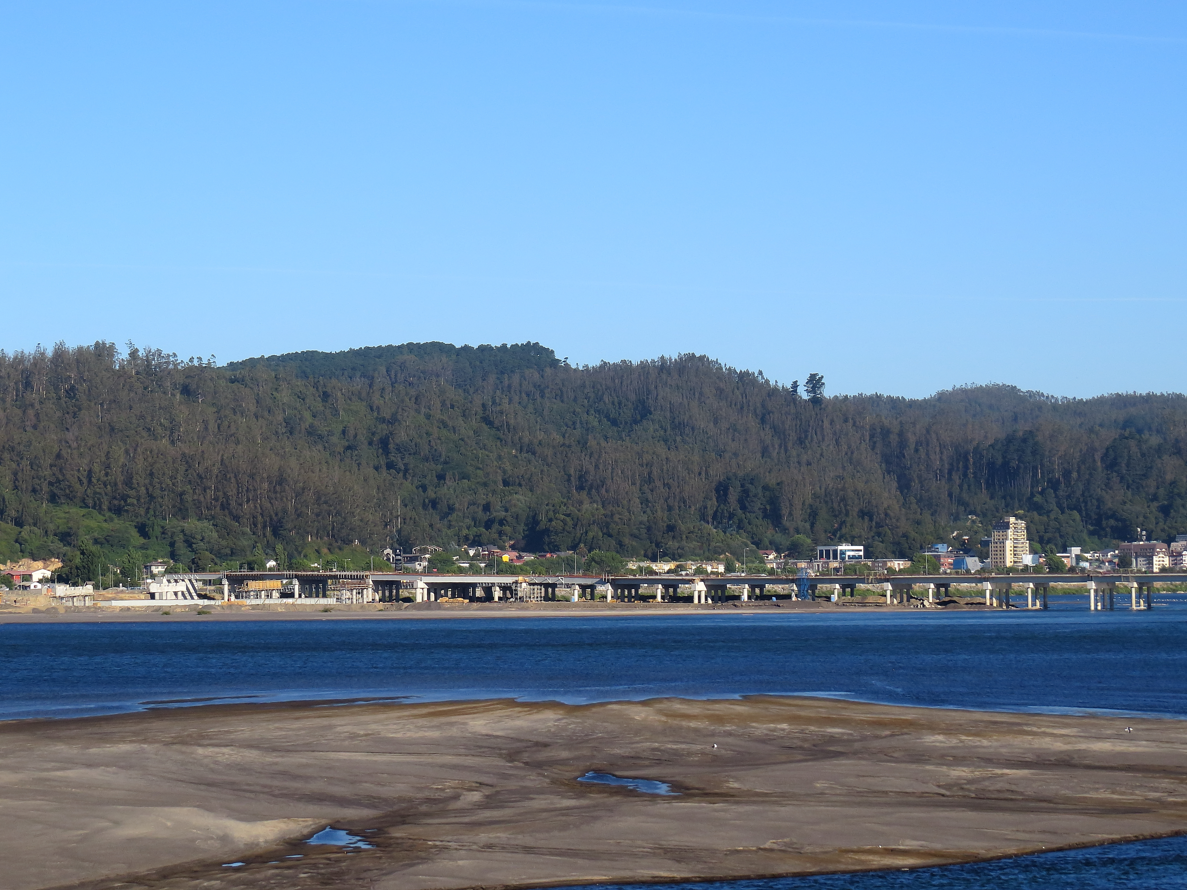 Puente Chacabuco sobre el río Bíobío